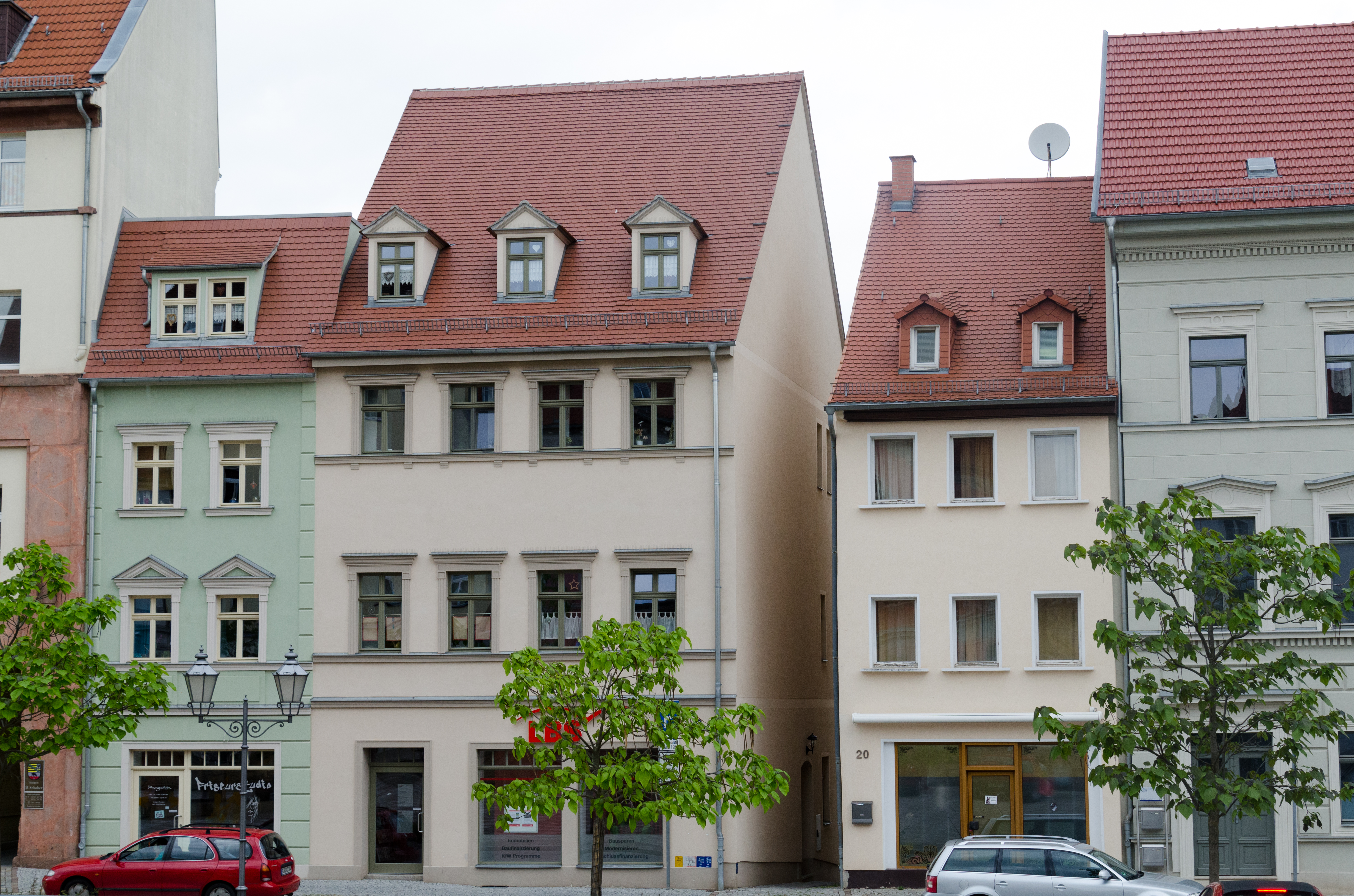 Zeitz, Neumarkt 21, 20